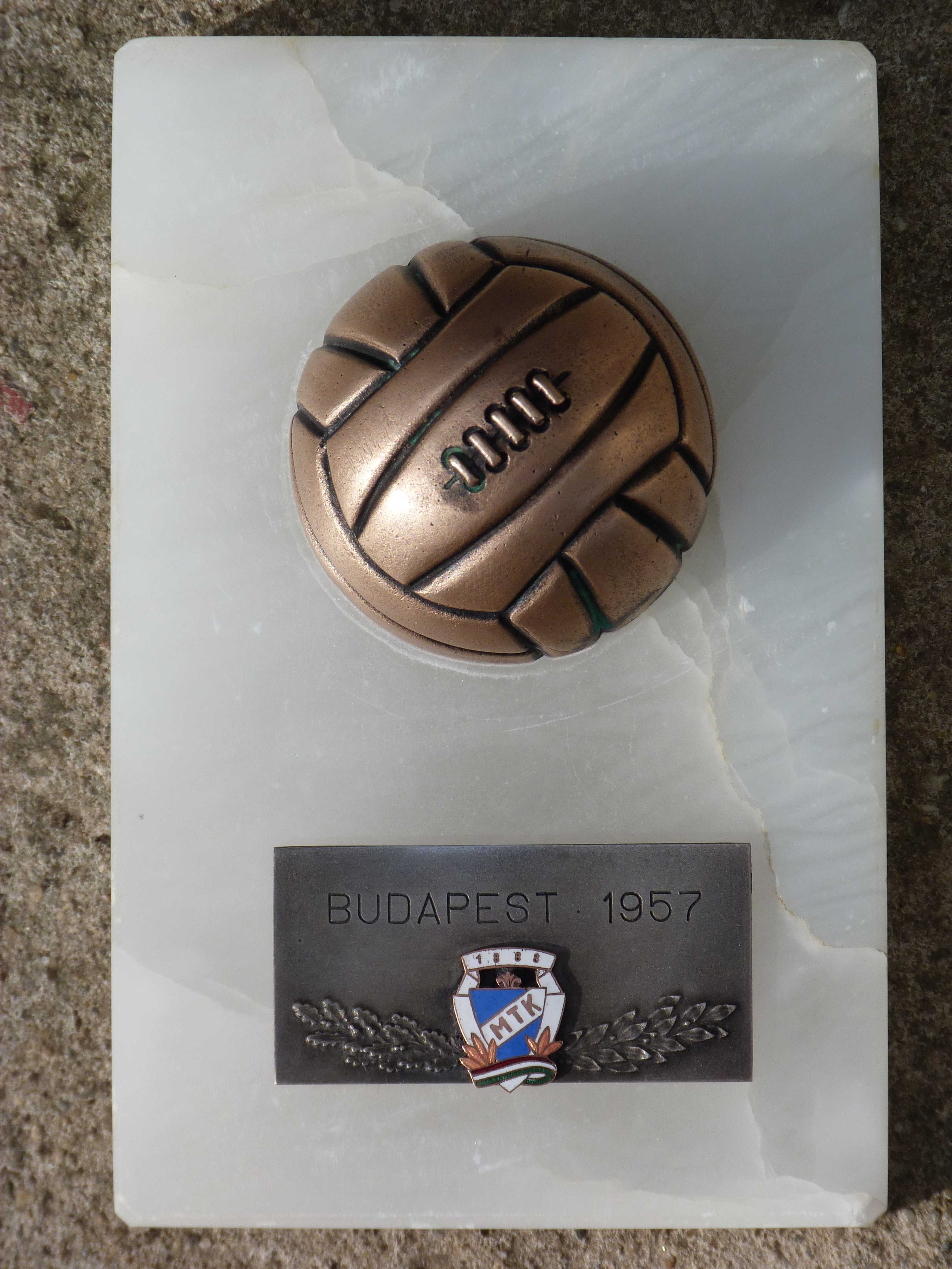 Live on the 11th of November, 2012. Marble with copper football, plakett with the emblem of the Magyar Testnevelők Köre (MTK) football club. During the 1956 freedom fight the tournament was delayed. Later on, spring 1957 the so called spring cup was held. MTK won the second prise after Újpest. This piece belong to Csopotiné Dr. Rácz Lili, chief accountant of the Club at the time ©© Published under Creative Commons in the Metapolisz DVD line. All of the photos and vids in the Metapolisz DVD line are under Creative Commons and can be used even for commercial – for profit – purposes. Recommended Citation Derzsi Elekes Andor: Metapolisz DVD line Tags: football Magyar Testnevelők Köre MTK 1957 Budapest Magyarország Metapolisz Tavaszi Bajnokság - Budapest 1957 A felvétel 2012. november 11 -én készült. Márvány alap (9,6 cm x 14,8 cm x 2,2 cm), réz futball labdával (átmérő 5,3 cm), fém plakett jelvénnyel (felirat: BUDAPEST 1957 és 1888 MTK). A szabadságharc alatt félbeszakadt 1956 –os idényt követően, az 1957-es szezonban már újra MTK néven szerepelt a sportklub. (Magyar Testgyakorlók Köre volt a klub neve 1888 és 1926 között). Visszatért a kispadra Bukovi Márton edző is. Ebben a "tavaszi" bajnokságban második helyen végeztek a kék-fehérek, a góllovőlista második helyezettje Hidegkuti Nándor. A klub legendás labdarúgója az edzőségre készült és Bukovi segítőjeként dolgozta végig a szezont. Az emléklap Csopotiné Dr. Rácz Lilinek, a Klub főkönyvelőjének tulajdona volt ©© Megjelent Creative Commons alatt a Metapolisz sorozatban. A Metapolisz sorozat valamennyi képe és filmje Creative Commons alatti valamint kereskedelmi - for profit - célra is felhasználható. Ajánlott hivatkozás: Derzsi Elekes Andor: Metapolisz DVD line Cimkék: 1957-es magyar labdarúgó-bajnokság (első osztály) Csopotiné Dr. Rácz Lili főkönyvelő